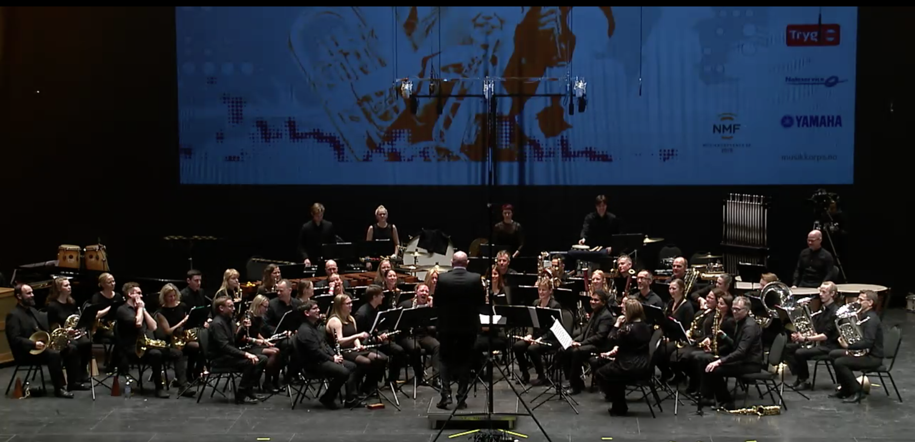 Opus82